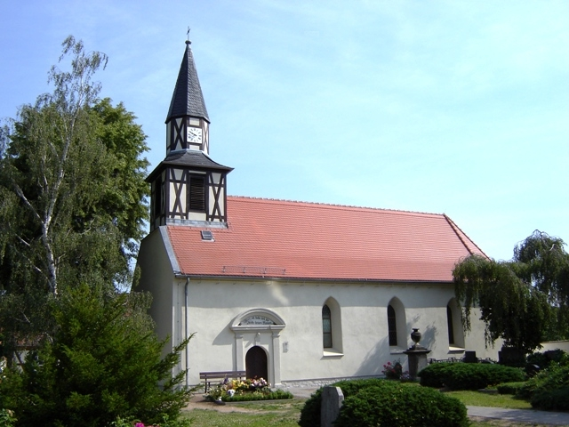 Kirche in Magdeburg-Pechau